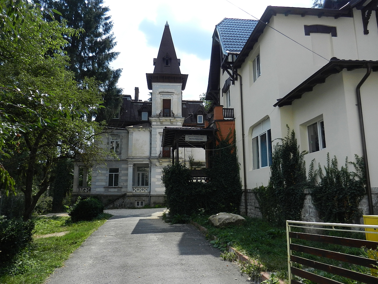 Casă, azi secție a Spitalului de Copii Sinaia